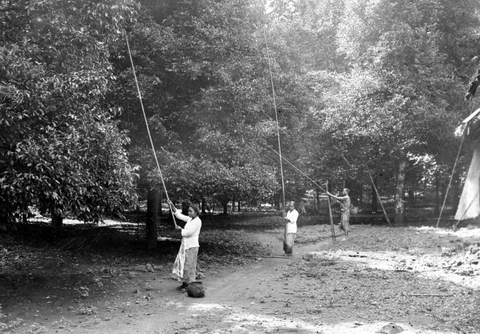 Repronegatief. Nootmuskaatpluksters aan het werk op het eiland Banda, Molukken